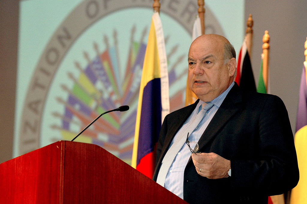 La reunión, que convoca a quinientos jóvenes y académicos del continente, fue inaugurada por José Miguel Insulza. Representantes de 35 universidades de América se reunirá por primera vez en Santiago para participar en una instancia que simula una Asamblea General de este organismo. El encuentro es organizado por el Departamento de Relaciones Externas de la OEA, el Centro de Estudios Internacionales de la Universidad Católica y la Corporación Participa.